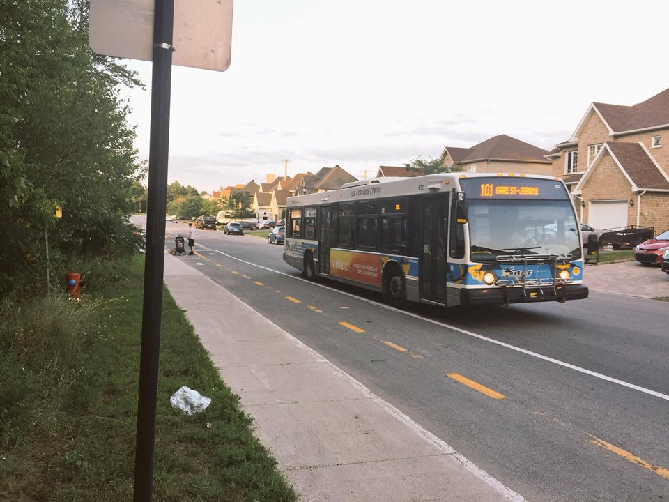 Autobus du circuit 101 circulant sur la rue André-Prévost, dans le secteur Saint-Antoine, en août 2018.